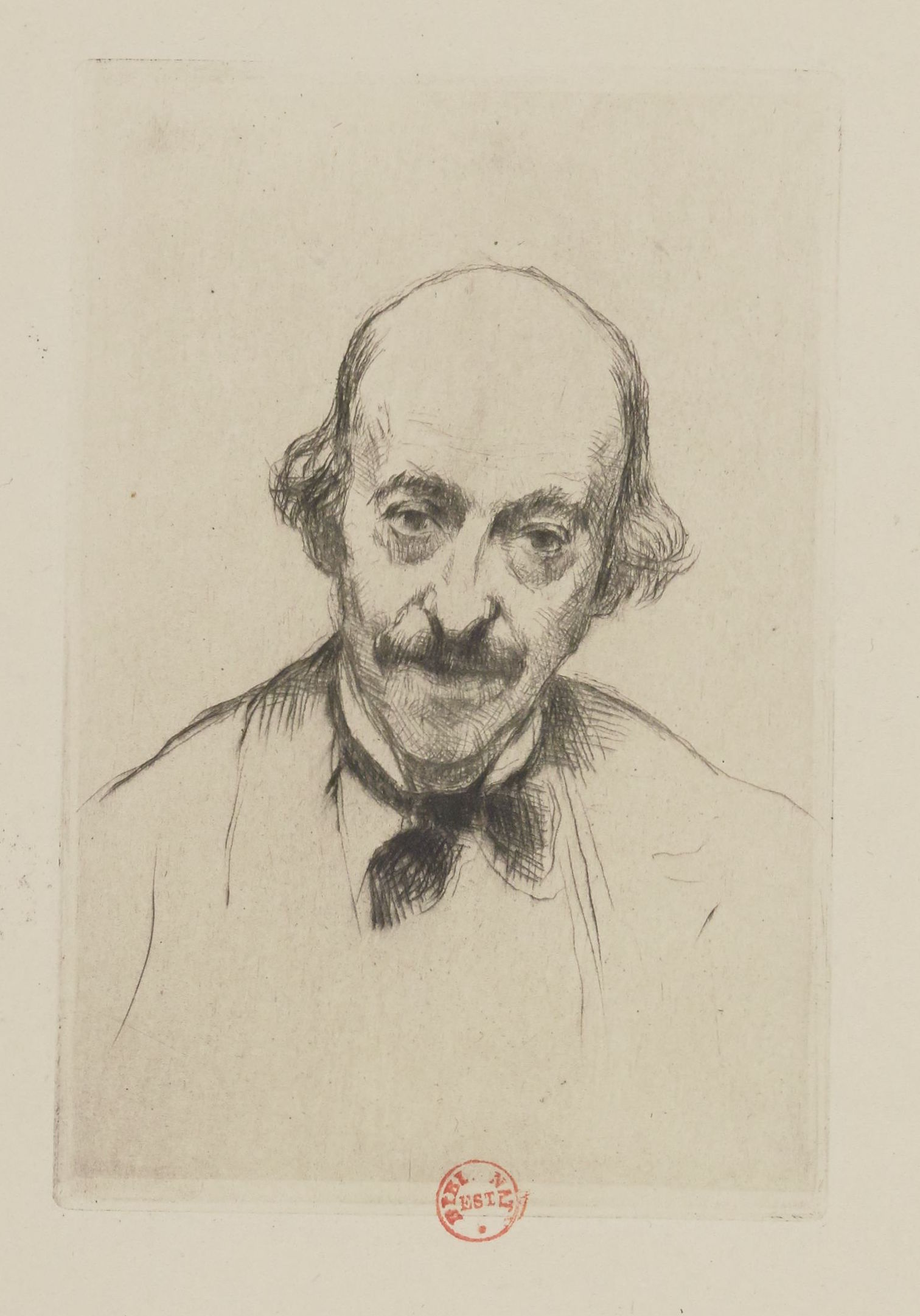 Marcellin Desboutin, portrait d'Henry Cohen, pointe sèche, 1878. Exemplaire conservé à la Bibliothèque nationale de France, département Estampes et photographie, FOL-EF-415 (I, 2)